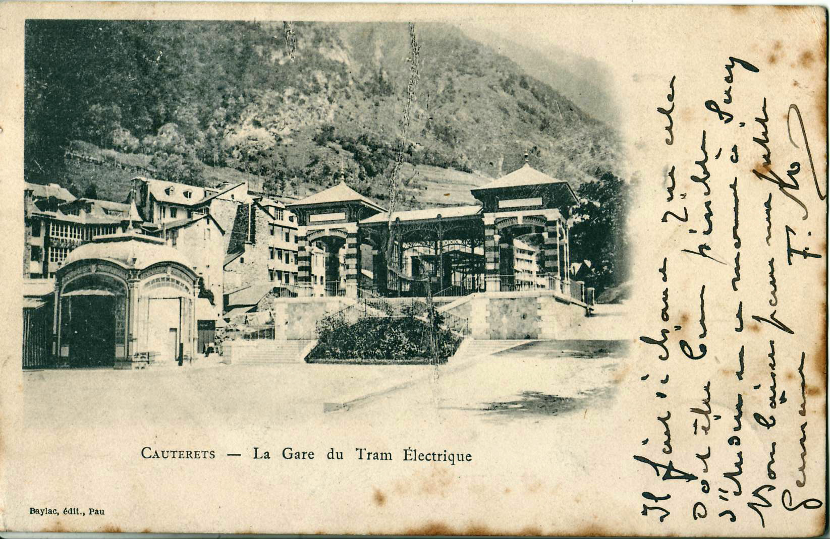 Carte postale ancienne édtitée par Baylac à Pau : CAUTERETS - La Gare du Tram électrique